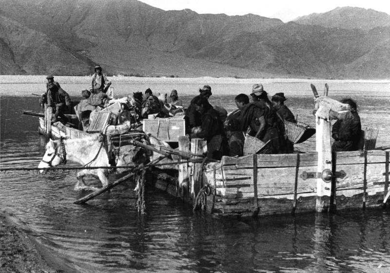 Tschagsam, Übersetzen beim Brahmaputra